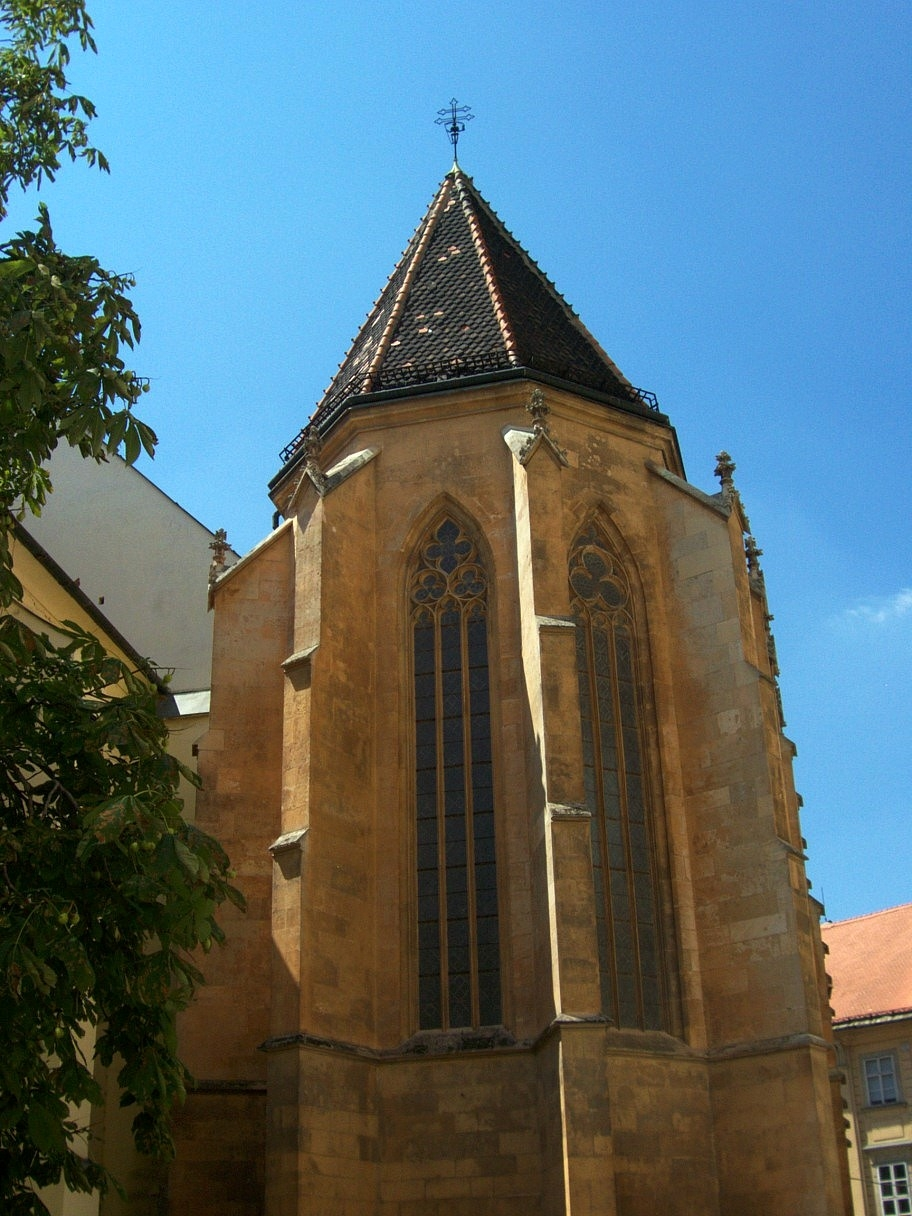 Kostol Zvestovania Pána v Bratislave. Exteriér kaplnky sv. Jána Evanjelistu. Kaplnka, postavená podľa vzoru Sainte-Chapelle v Paríži, predstavuje vrchol gotickej architektúry u nás